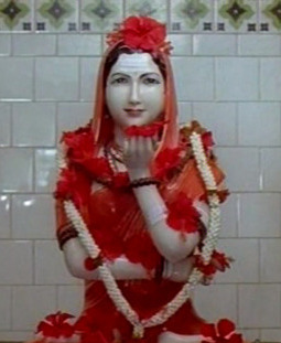 ಕನ್ನಡ: ಅಕ್ಕಮಹಾದೇವಿ ವಚನ ಸಾಹಿತ್ಯದ ಪ್ರಮುಖರಲ್ಲೊಬ್ಬರು. ಅಕ್ಕಮಹಾದೇವಿ ಕನ್ನಡದ ಪ್ರಥಮ ಮಹಿಳಾ ಕವಿಯತ್ರಿಯಾಗಿದ್ದಾರೆ.